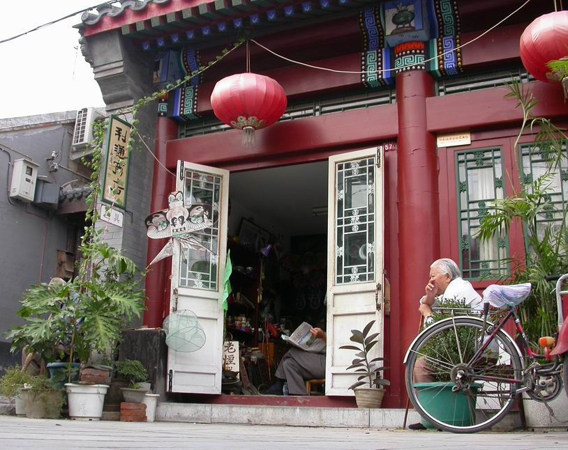 烟袋斜街，自拍